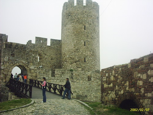 ...Плутон променио статус,ПотомОтом, аутор...